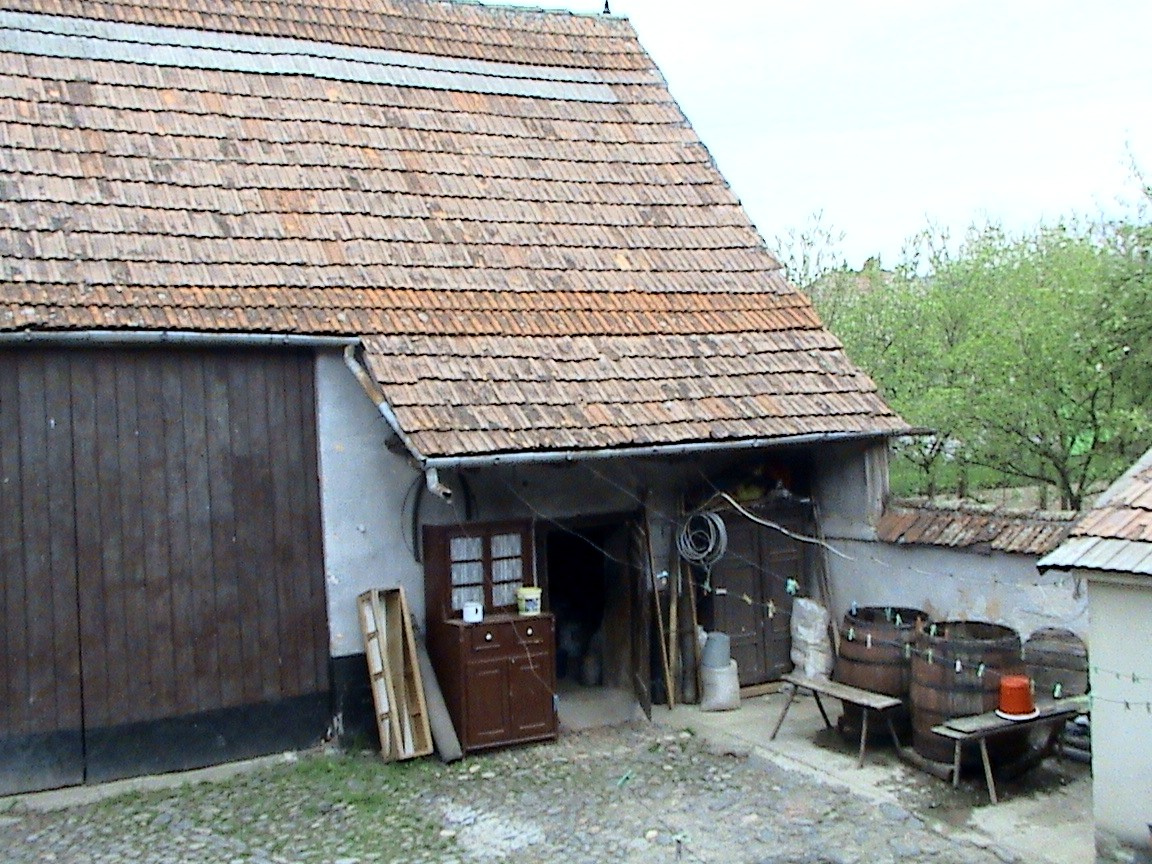 Şură din Racoviţa, Sibiu. Se poate observa o incintă care de-a lungul timpului a fost folosită tradiţional ca grajd pentru animale, depozit de diverse materiale sau chiar camera de locuit caz în care purta denumirea de "grăjduţ".